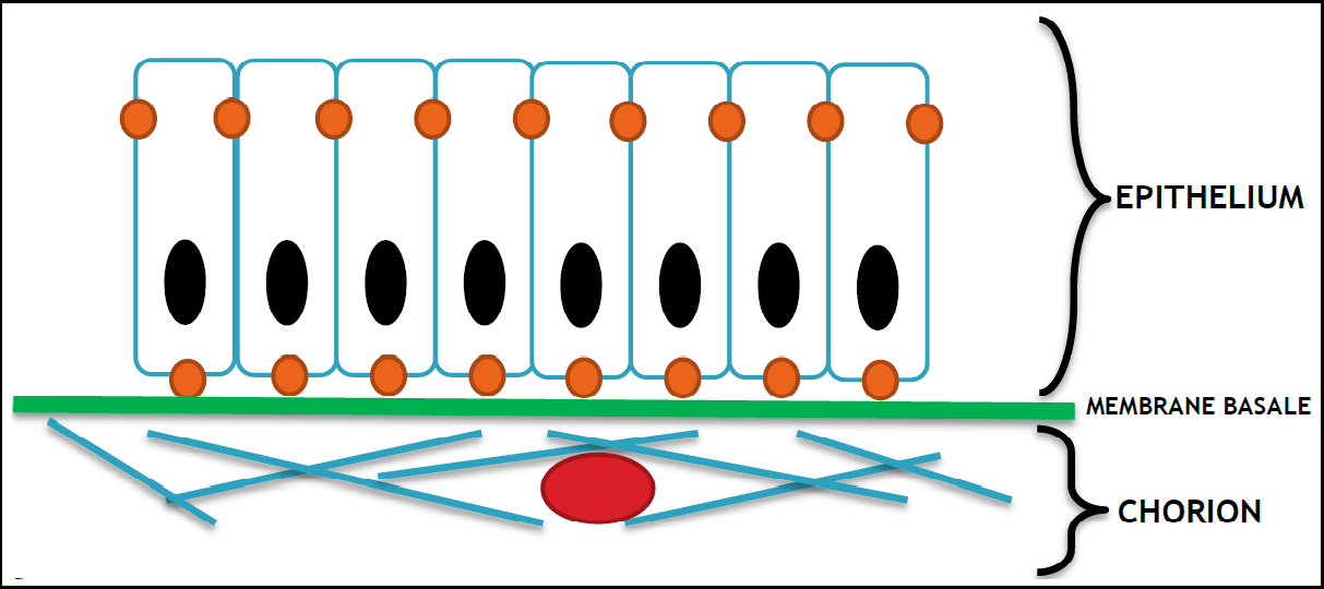 Organisation d'une muqueuse (épithélium, membrane basale et chorion). En rouge, un vaisseau qui va nourrir l'épithélium grâce au chorion.